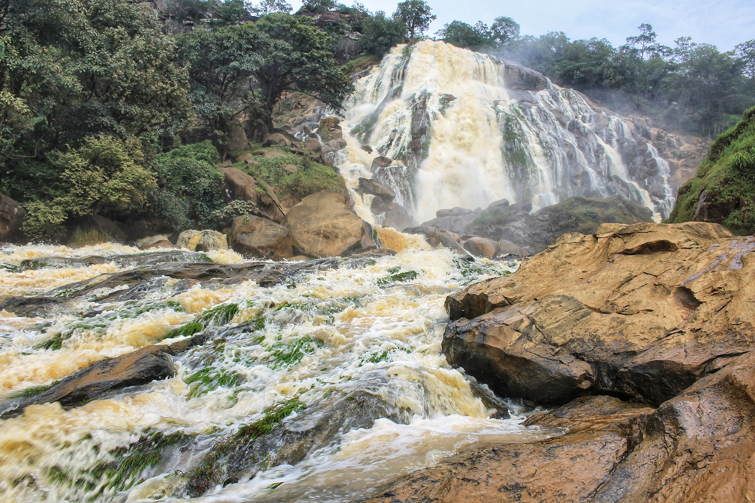 chutes de Lancrenon situées dans le village de Yamba. Localisation : Mbere, Adamaoua